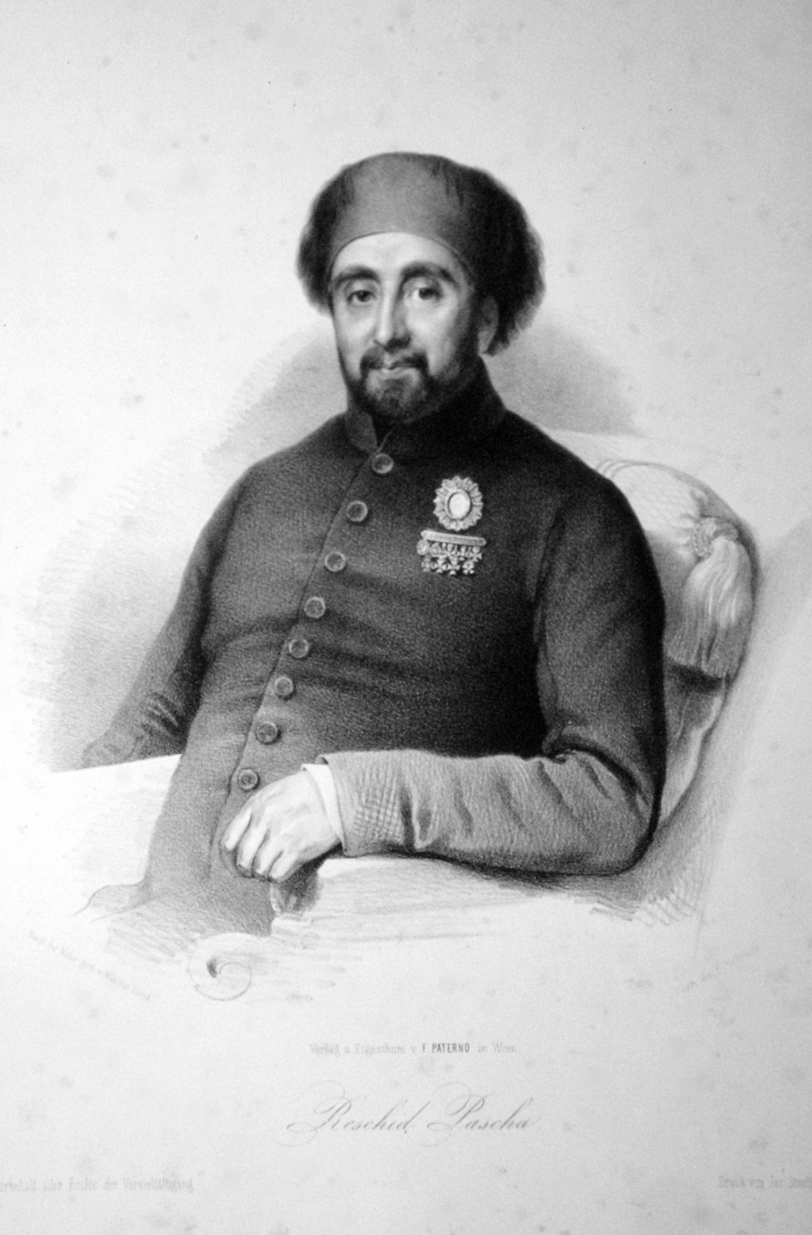 Mustafa Reşid Pascha (osmanischer Außenminister, Großwesir); Lithographie von Rudolf Hoffmann nach einer Zeichnung von Maxim David